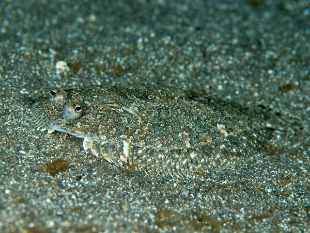 ダルマガレイ Engyprosopon grandisquama